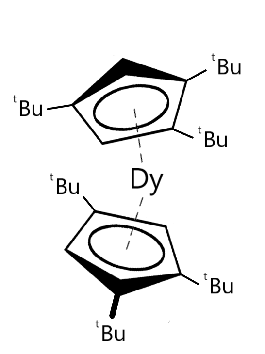 Molécule de dysprosocenium (où Dy = dysprosium et tBu = tertio-butyle)